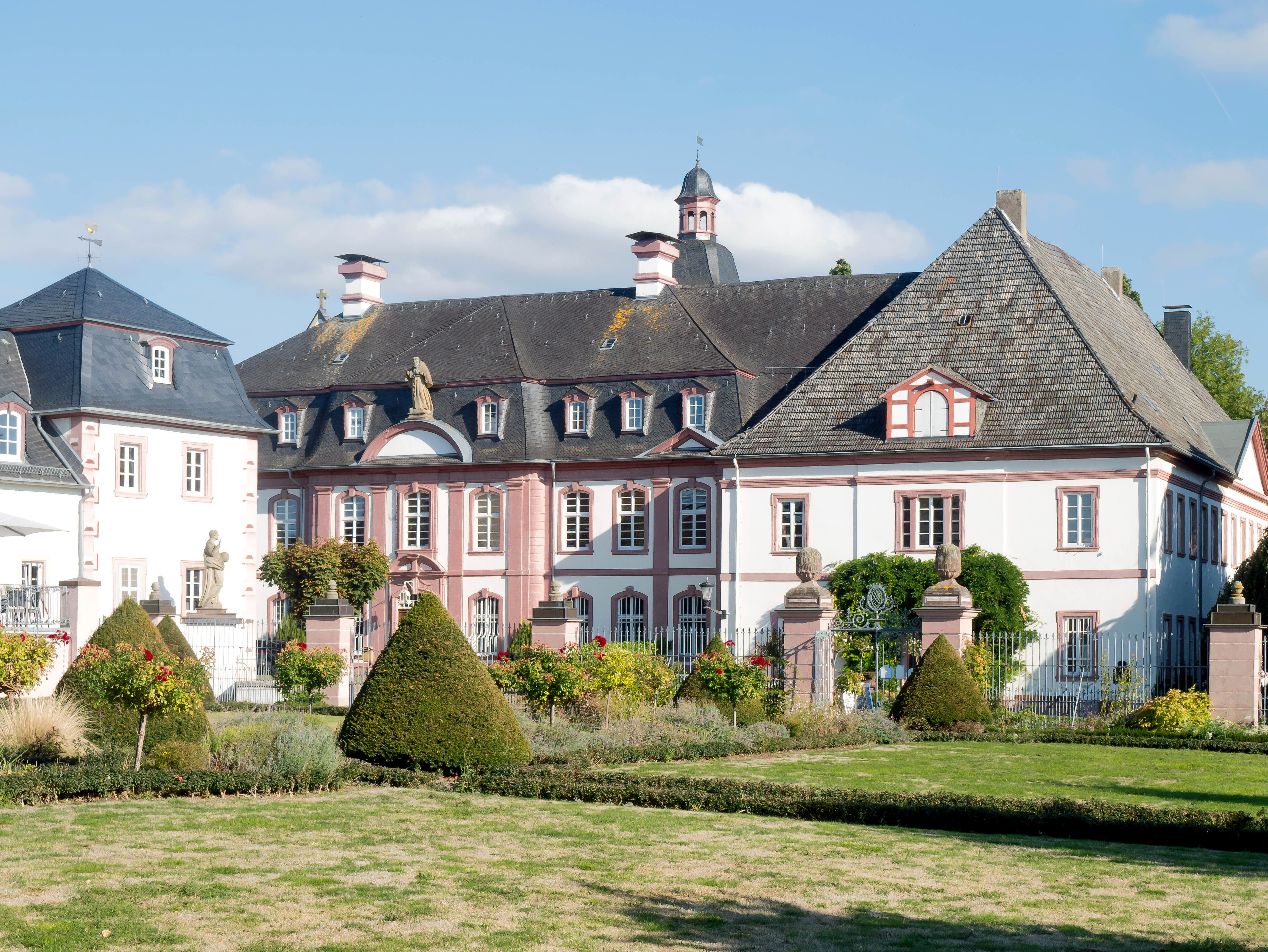 Blick vom Garten